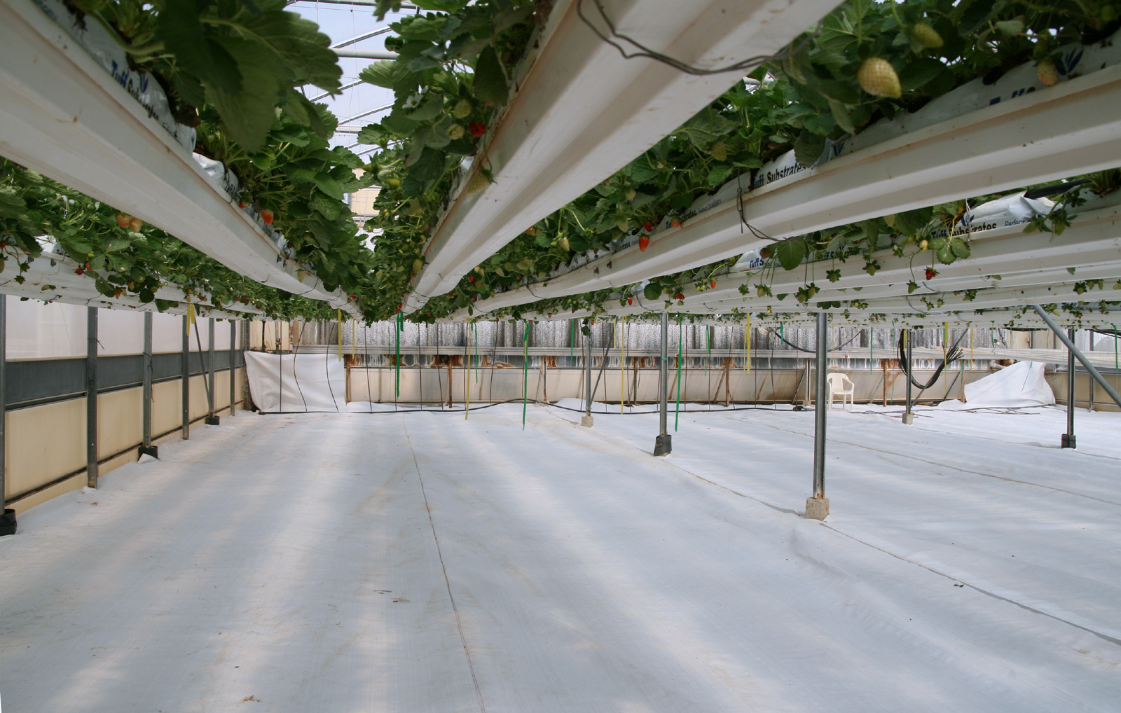 Culture hors sol de fraises